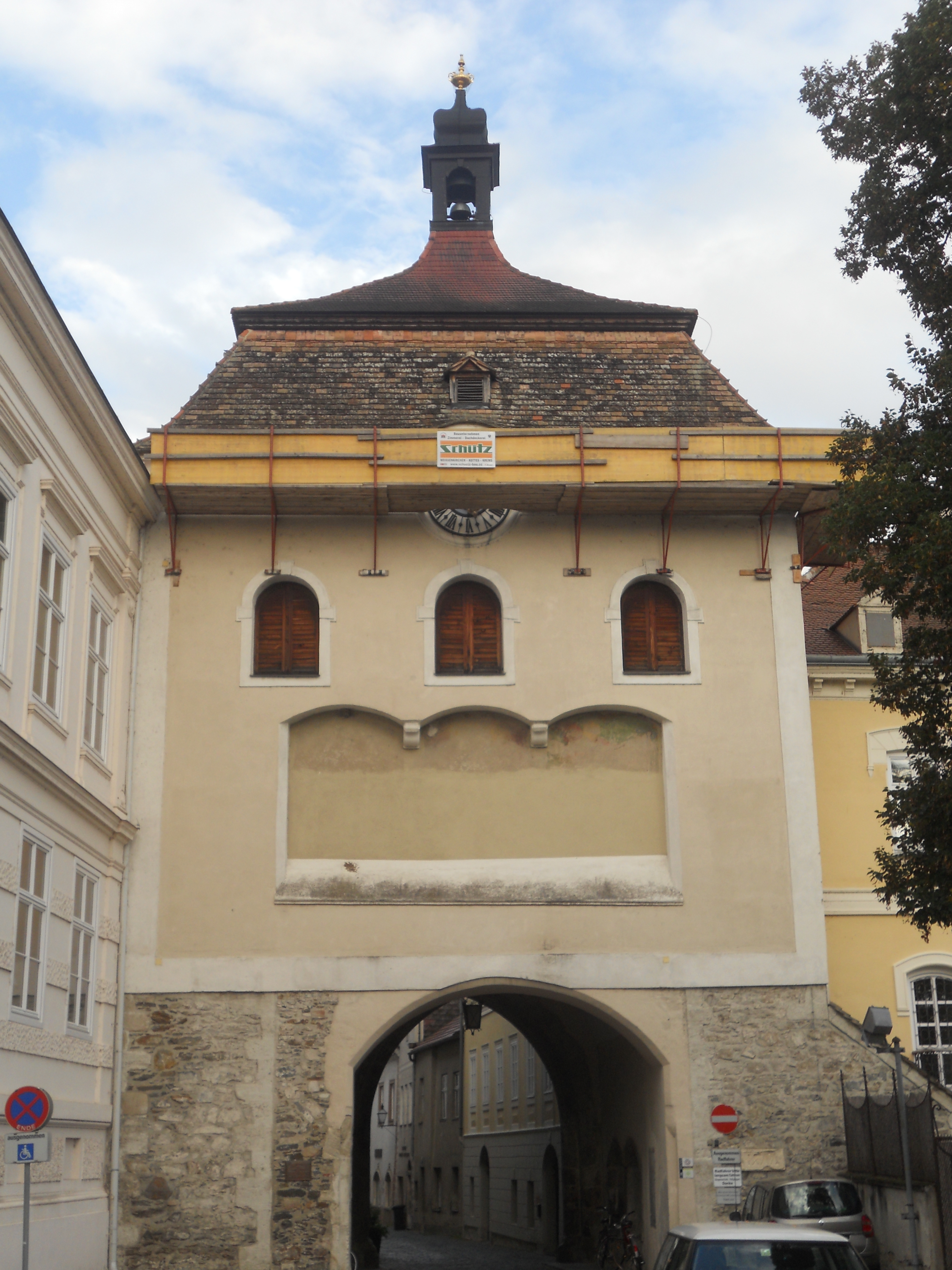 Linzer Tor